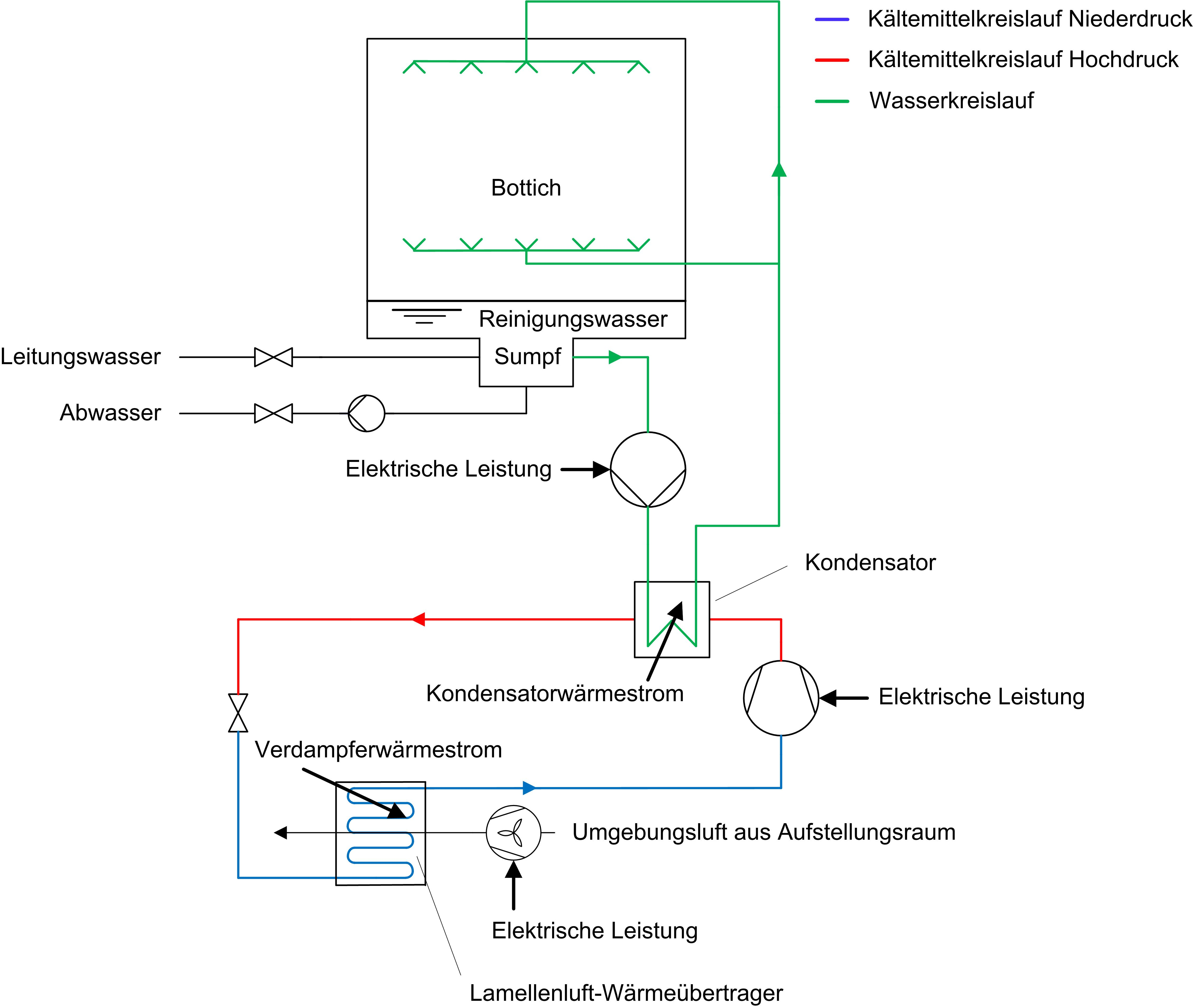 Prinzipschema eines Geschirrspülers mit Wärmepumpe, Einsatz eines Lamellenluft-Wärmeübertragers für den Verdampfer anstelle eines Latentwärmespeicher